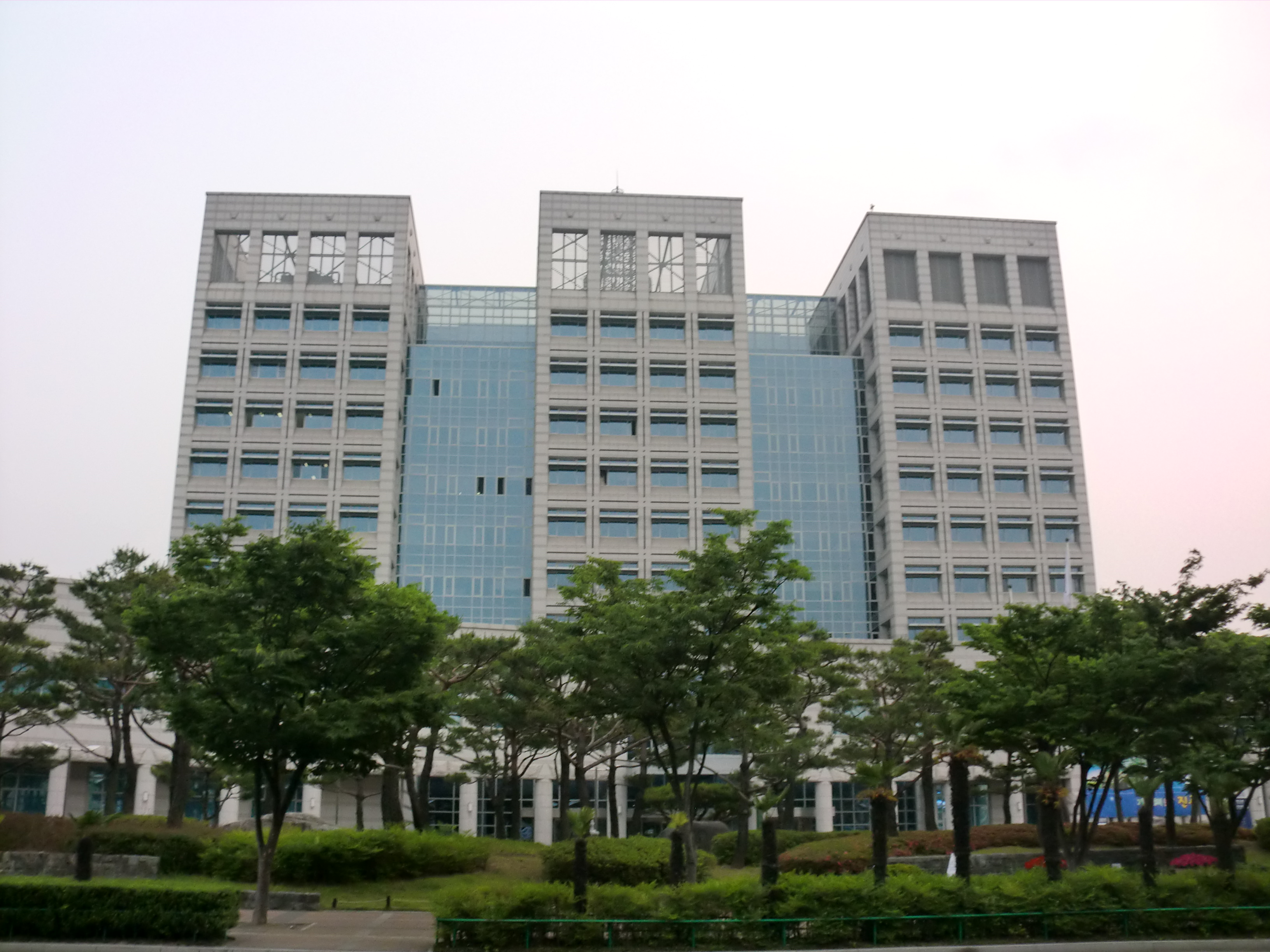 경상남도 진주시에 있는 진주시청